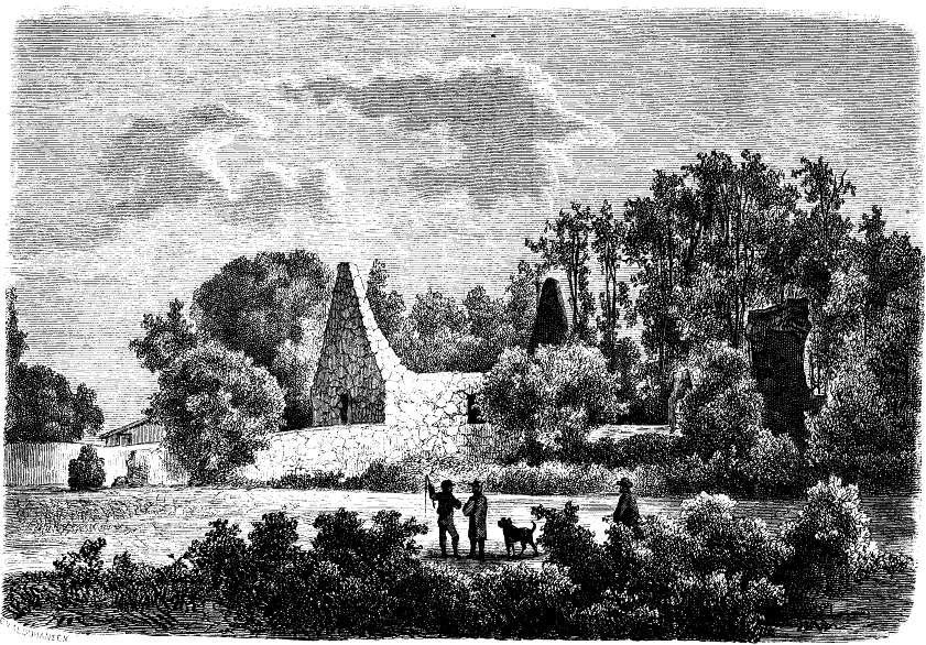 Nydala klosterruin, runeberg ,1872 Kategori:Bilder från Svenska Familj-Journalen